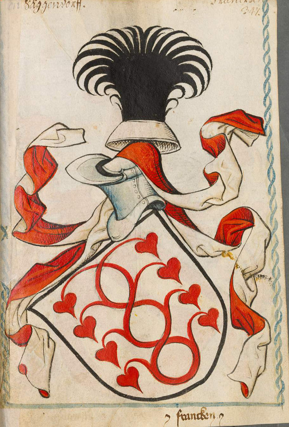 Scheibler'sches Wappenbuch , älterer Teil Seckendorf